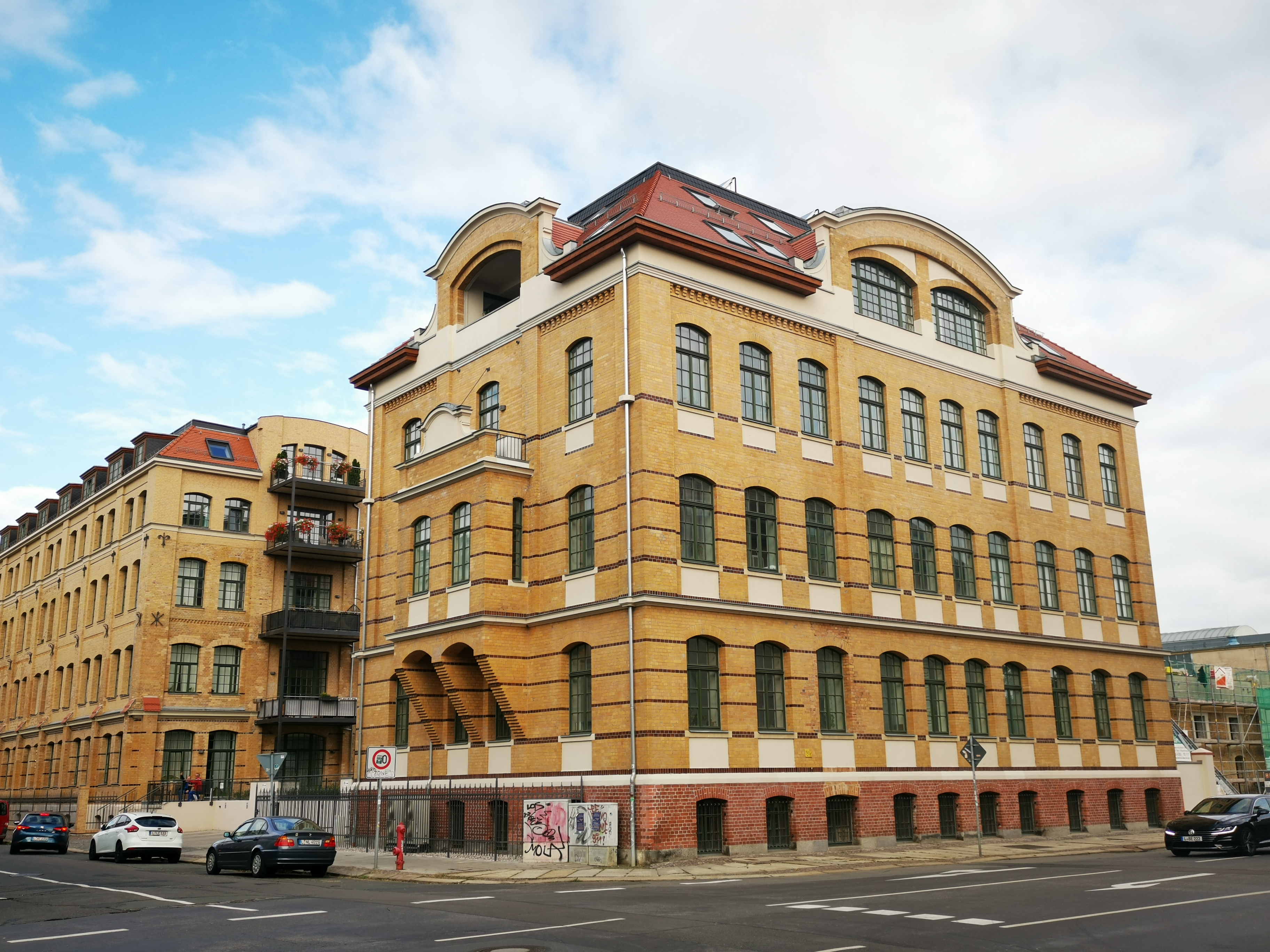 Nebengebäude der Globuswerke in der Limburger Straße